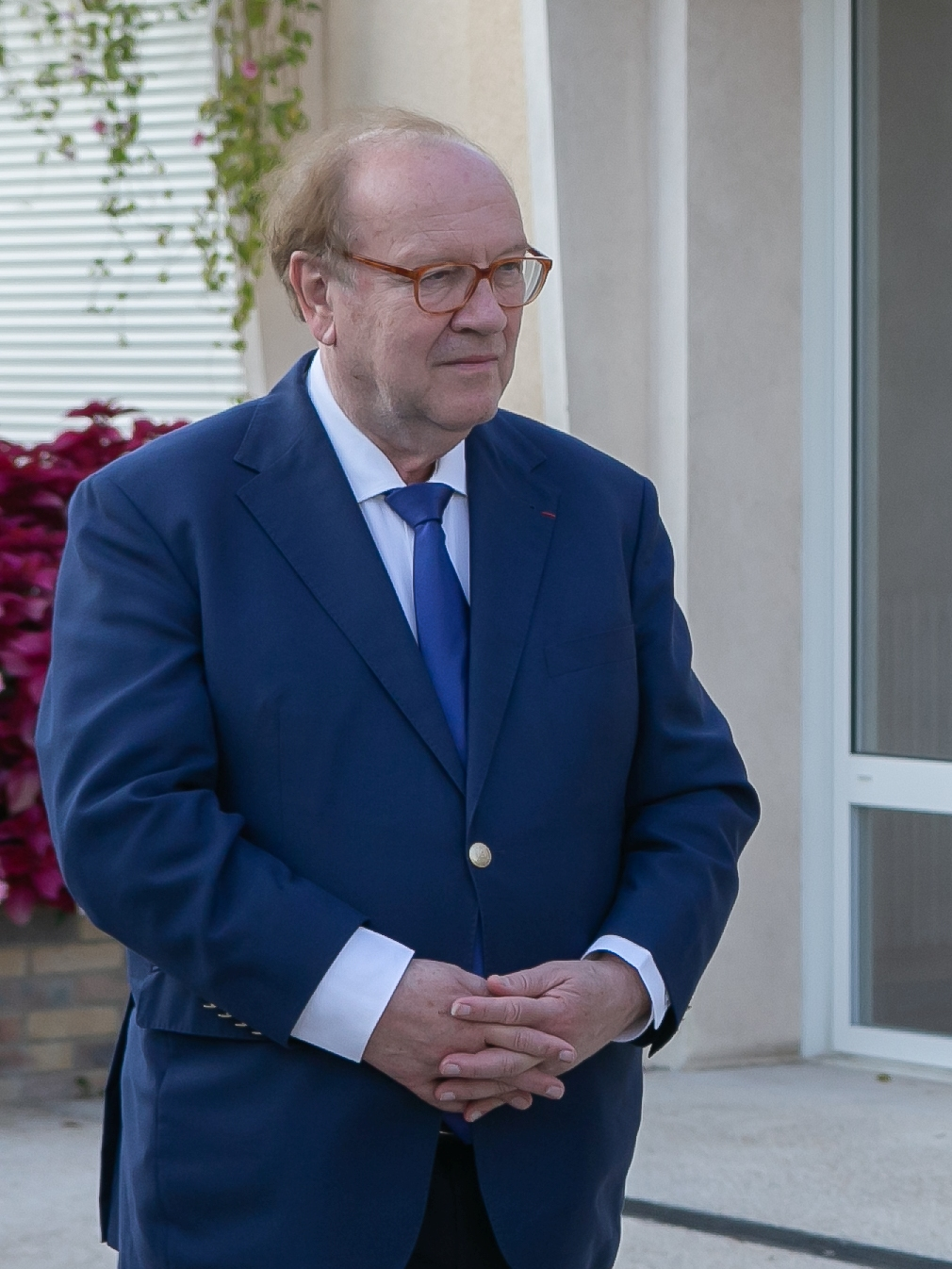 Jean-Pierre Bechter à Villabé lors de l'Inauguration de l'avenue du 8 mai 1945 (après sa rénovation) le 12 octobre 2018 à Villabé / Villabé, Essonne, France